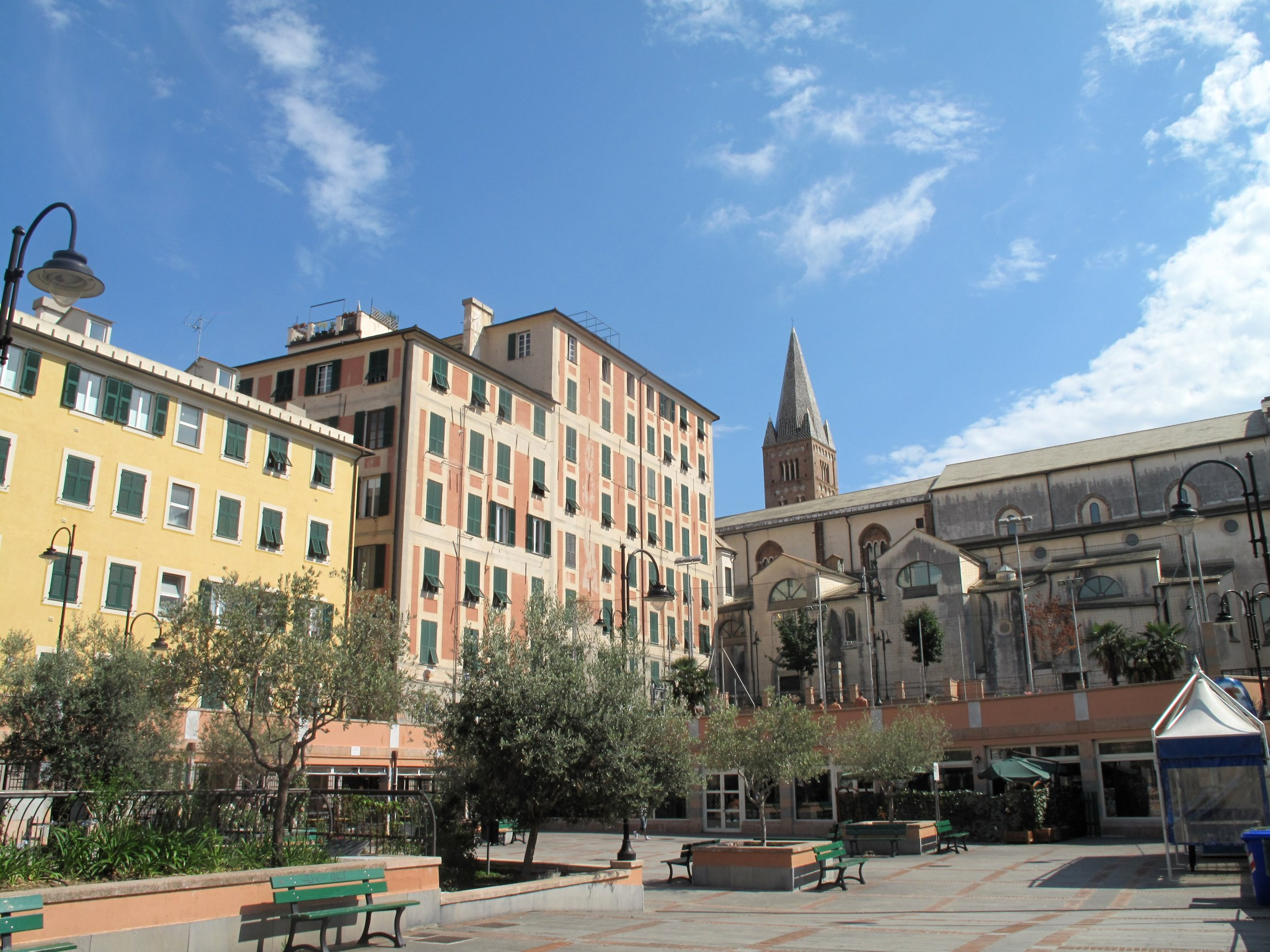 Vacances juillet 2011 en Ligurie